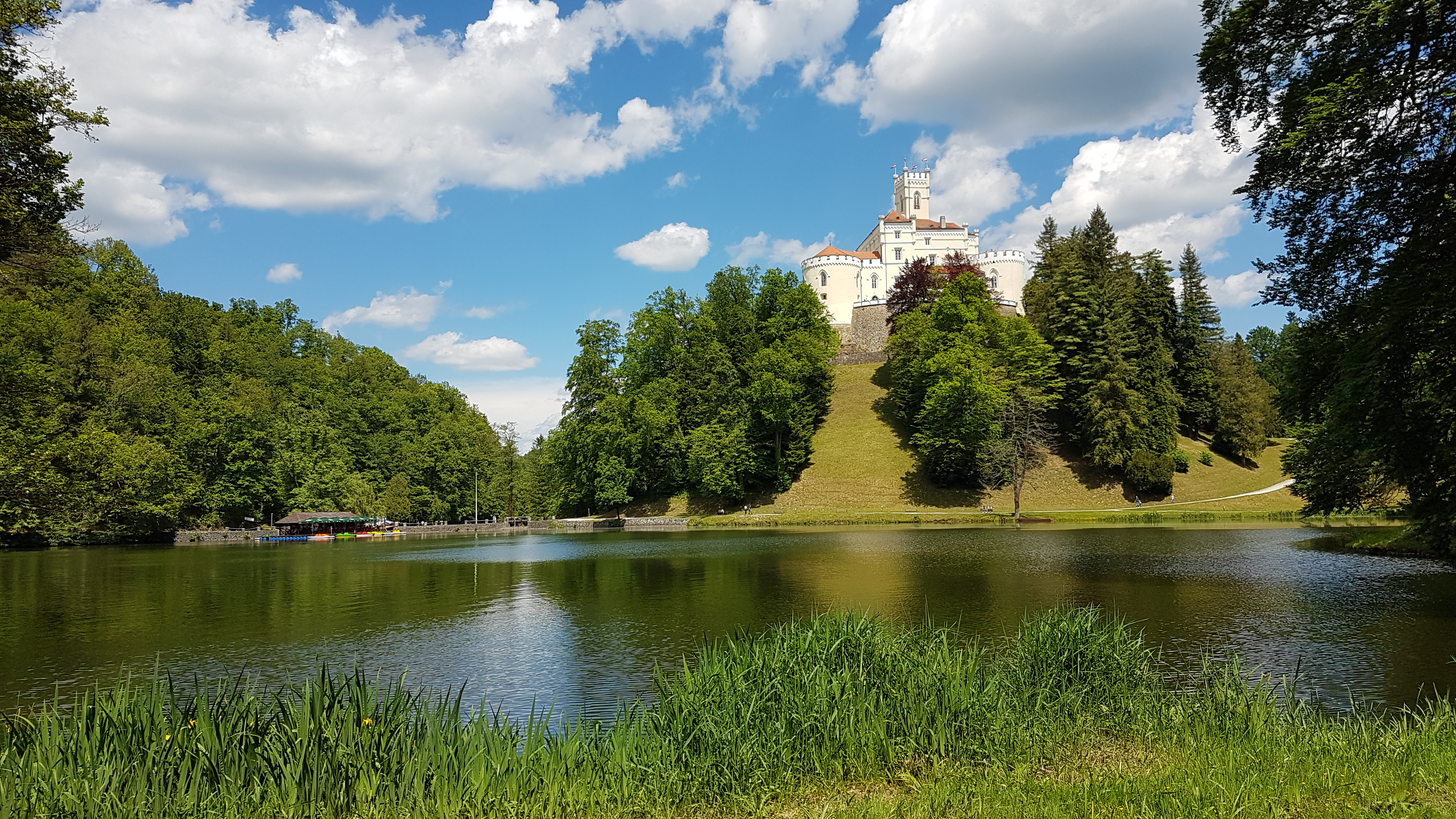 Dvorac Drašković s perivojem N-18